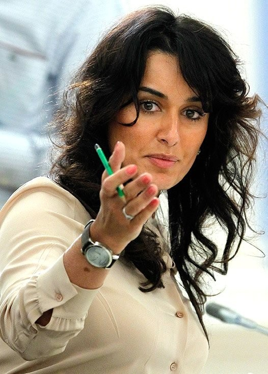 Тина Канделаки